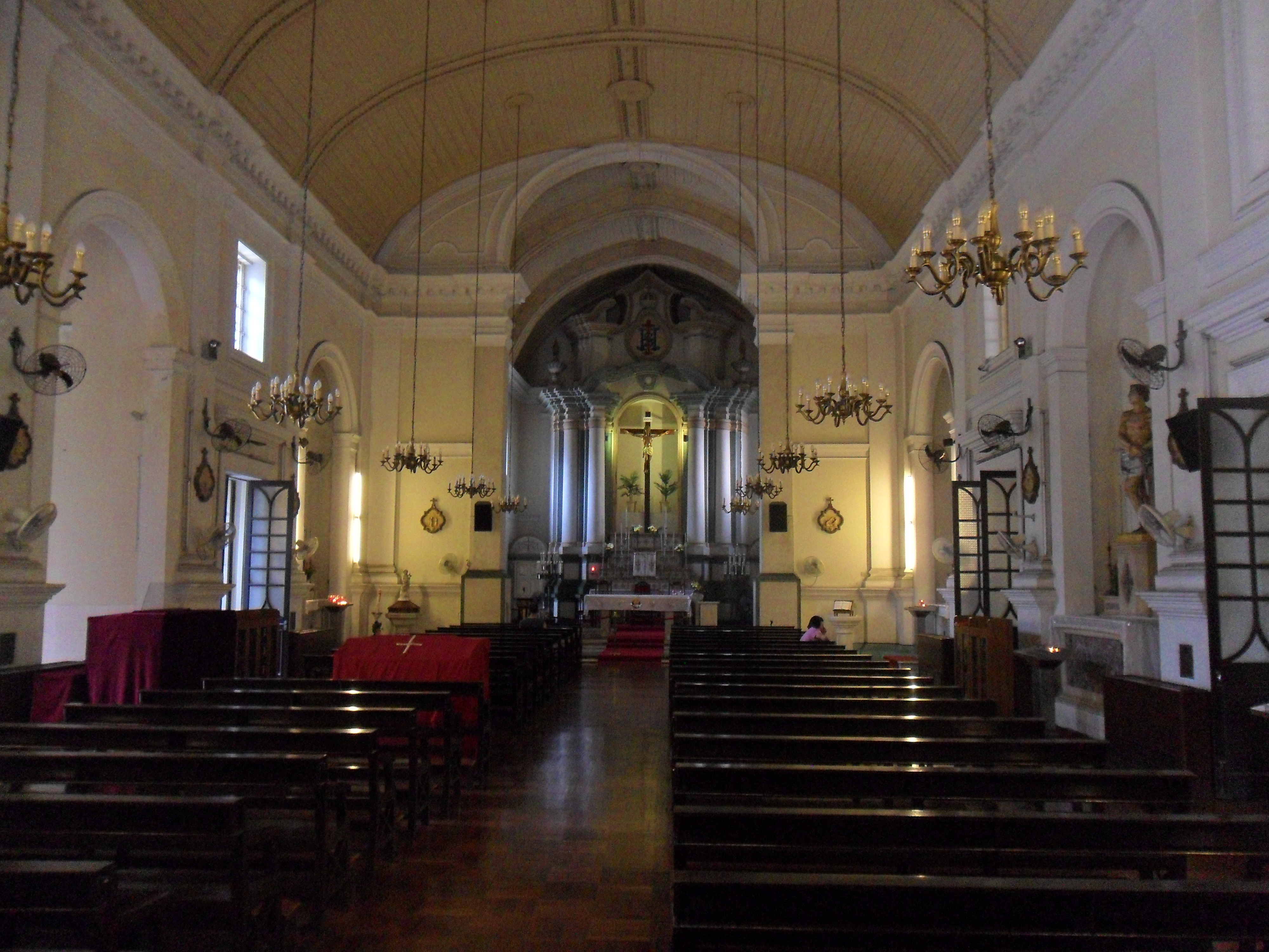 中文(香港):聖安多尼堂, 澳門, 中國